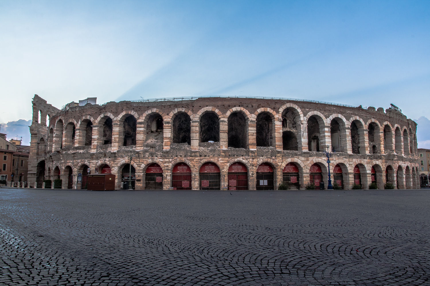 Arena di Verona